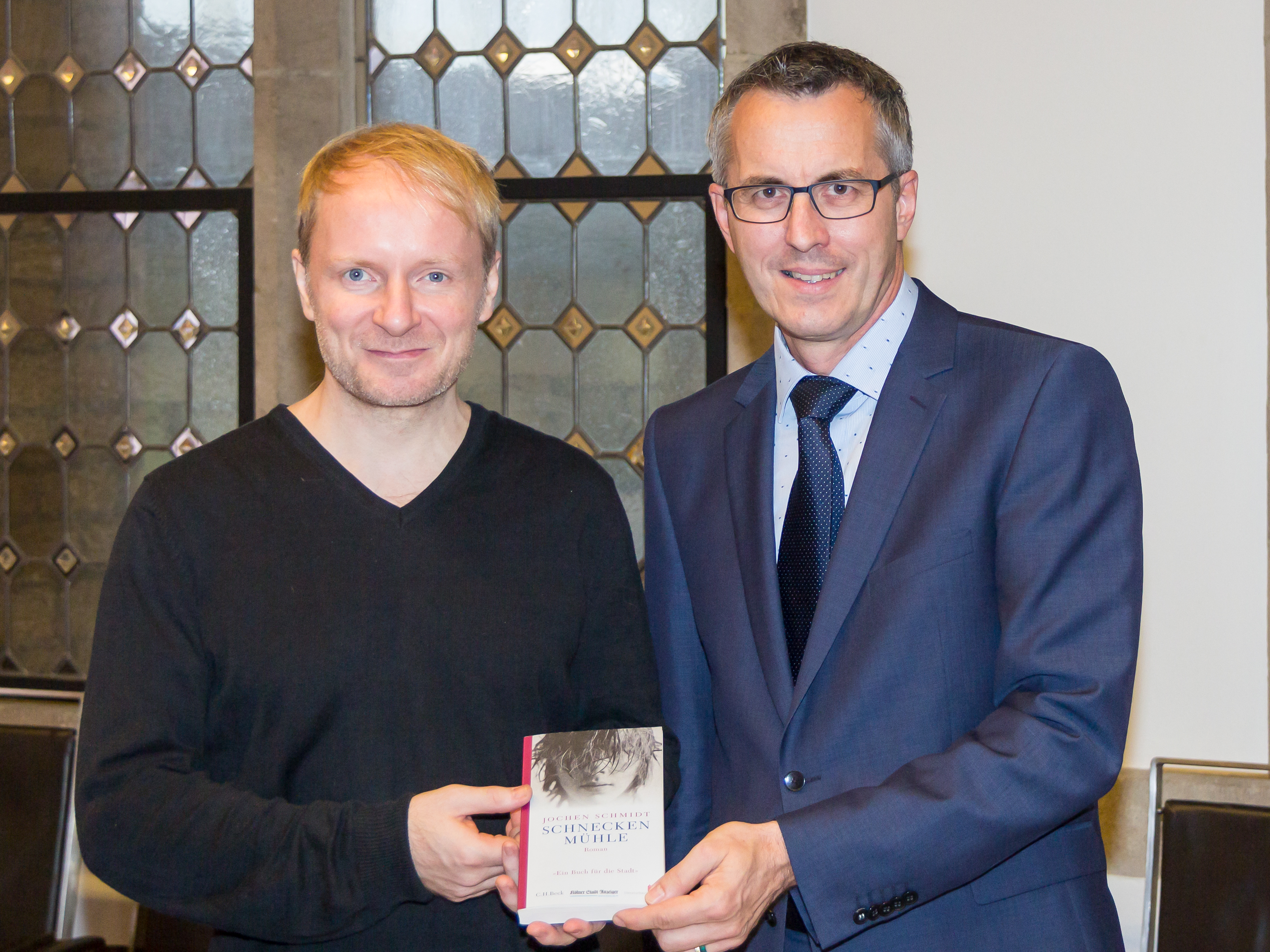 Empfang für Jochen Schmidt, Autor des Romans „Schneckenmühle“, das 2014 „Ein Buch für die Stadt“ ist Foto: Jochen Schmidt und Bürgermeister Andreas Wolter präsentieren das Buch